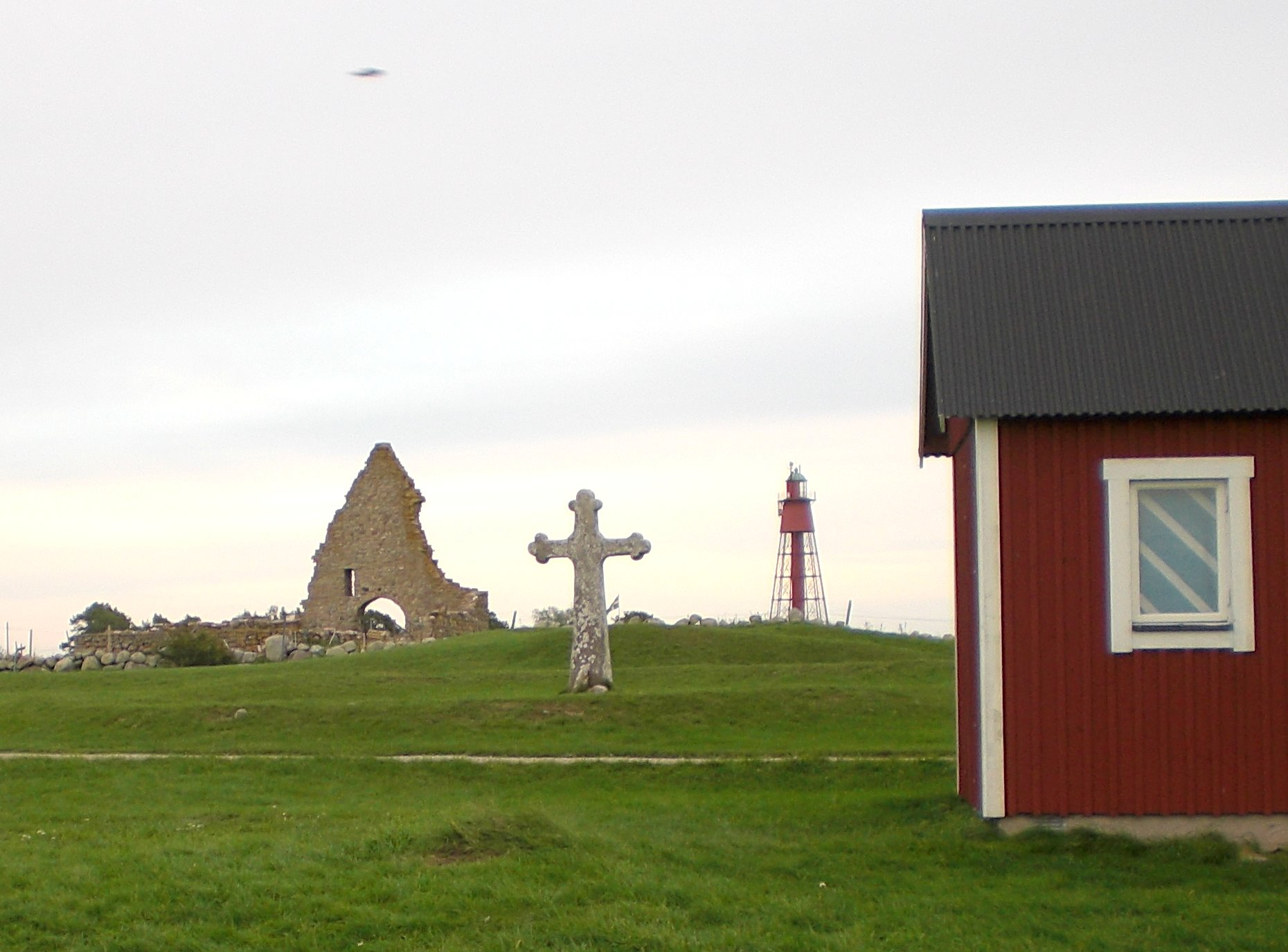 Kapelludden auf Öland, Fischereihafen, Steinkreuz, Sankt-Birgitta-Kapelle und Leuchtturm Kapelludden